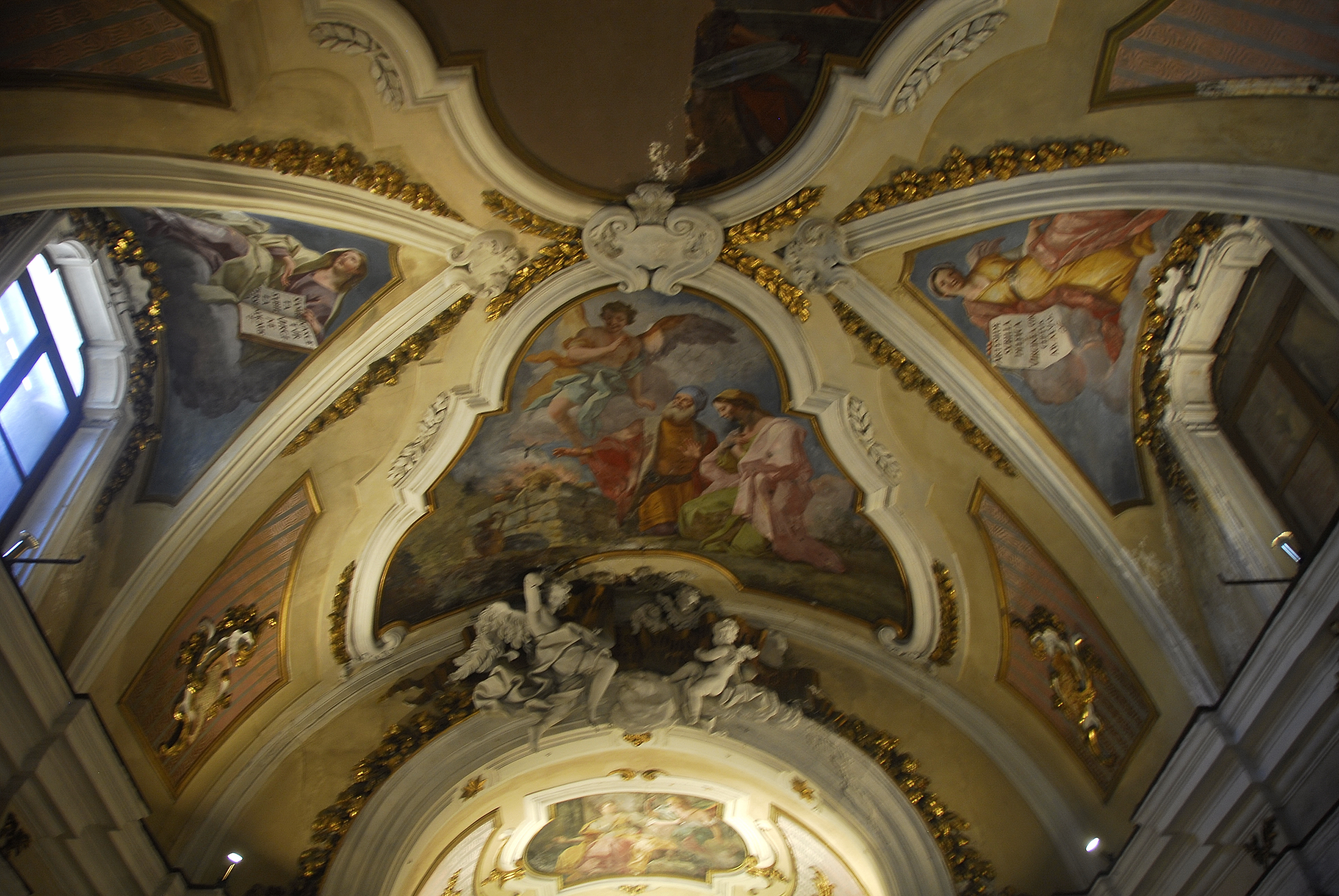 Chiesa di Santa Maria del Piliere - Santa Maria degli Angelini, Palermo, ITA, cripta